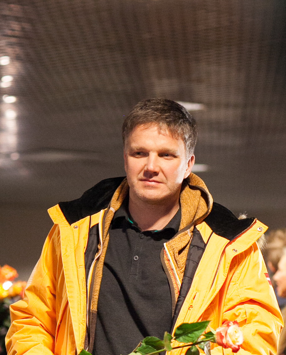 Sandis Prūsis